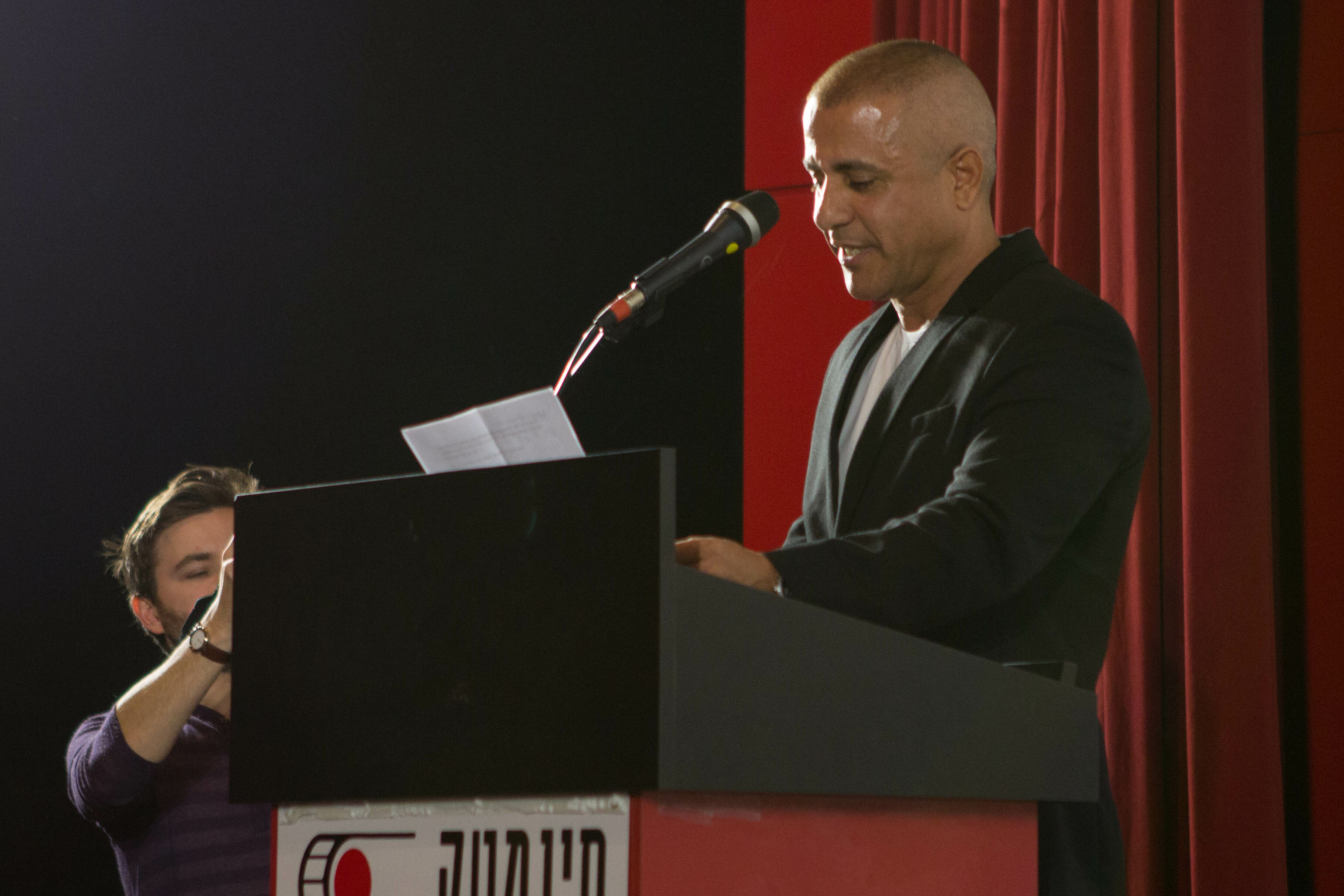 יוסי אשדות בפרימיירת הסרט: אתם אני והמלחמה הבאה בסינמטק תל-אביב